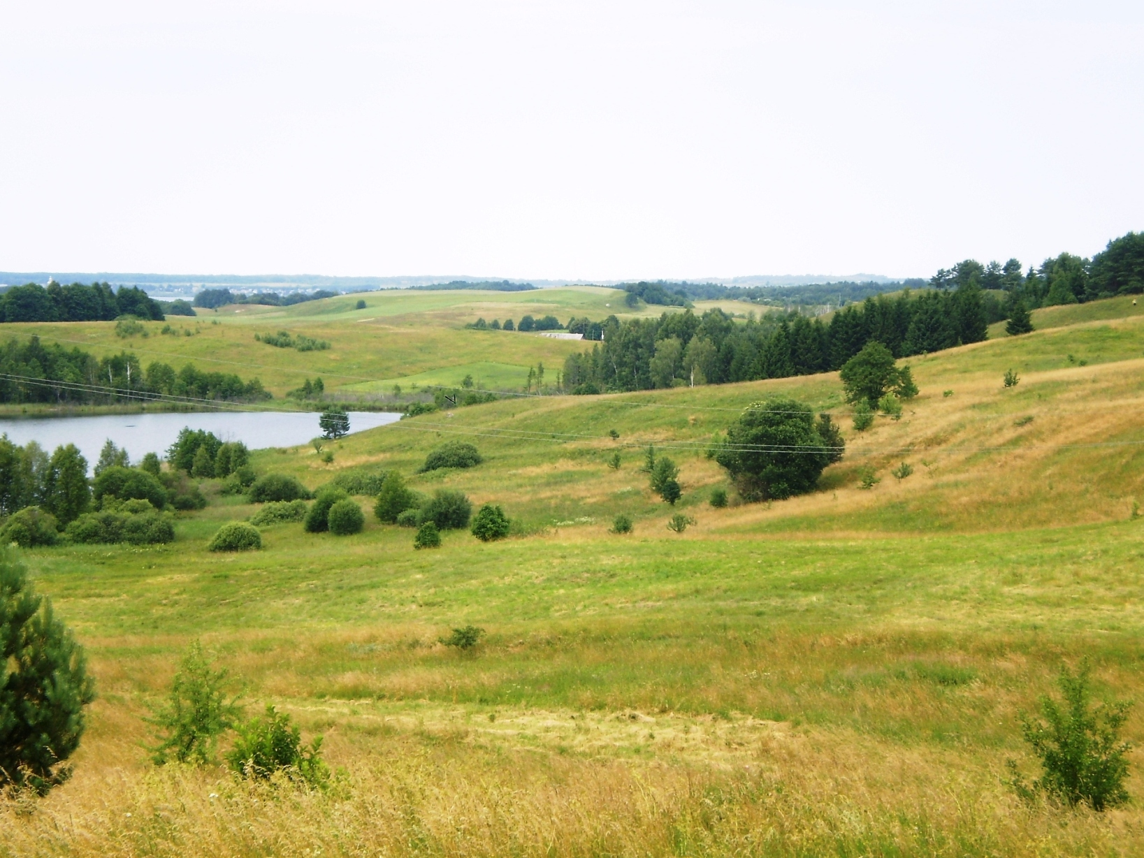 Sūduvos aukštuma, Vištyčio RP, Vilkaviškio raj.